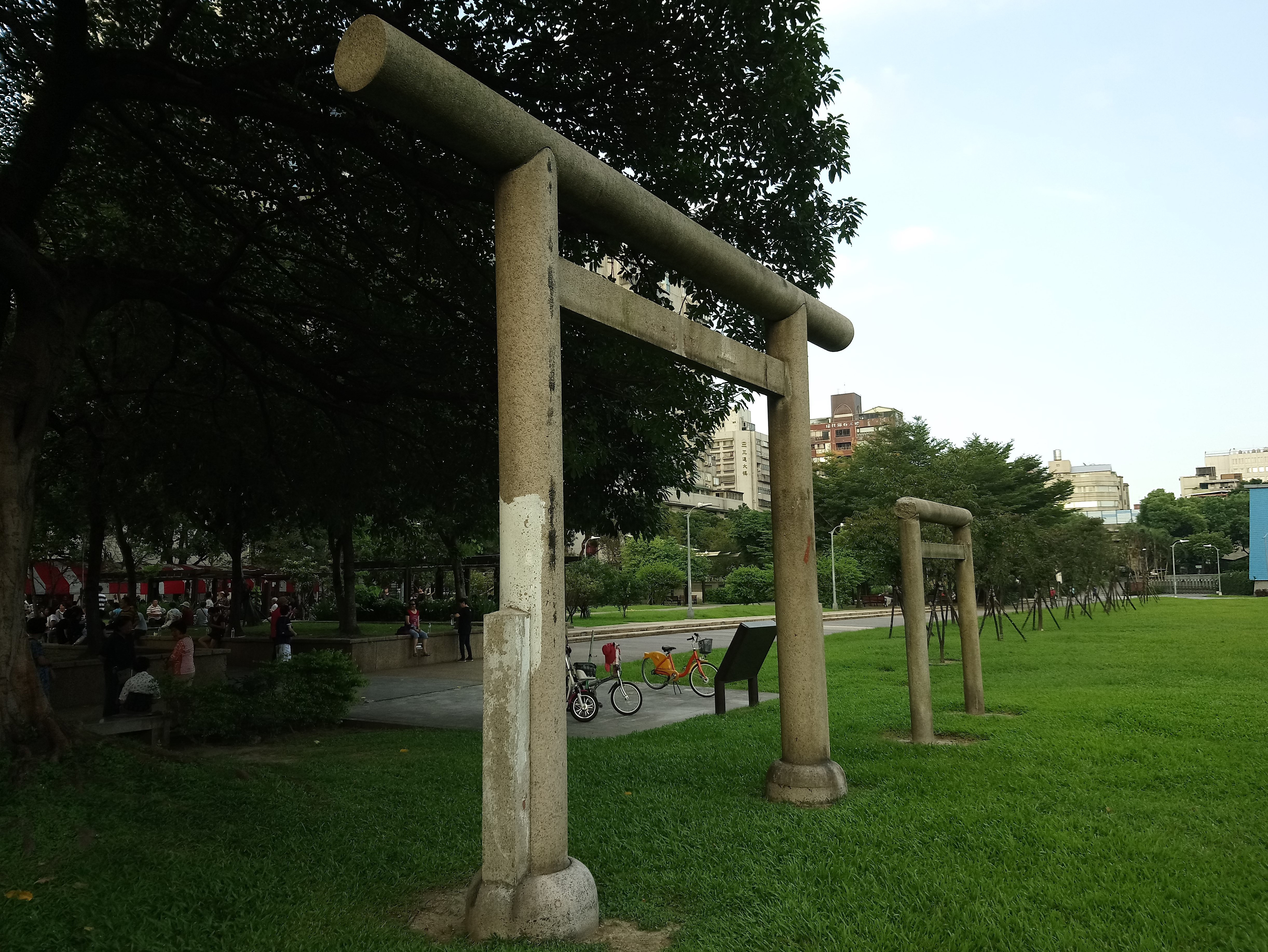 明石元二郎鳥居及鎌田正威鳥居,臺北市中山區林森次分區康樂里